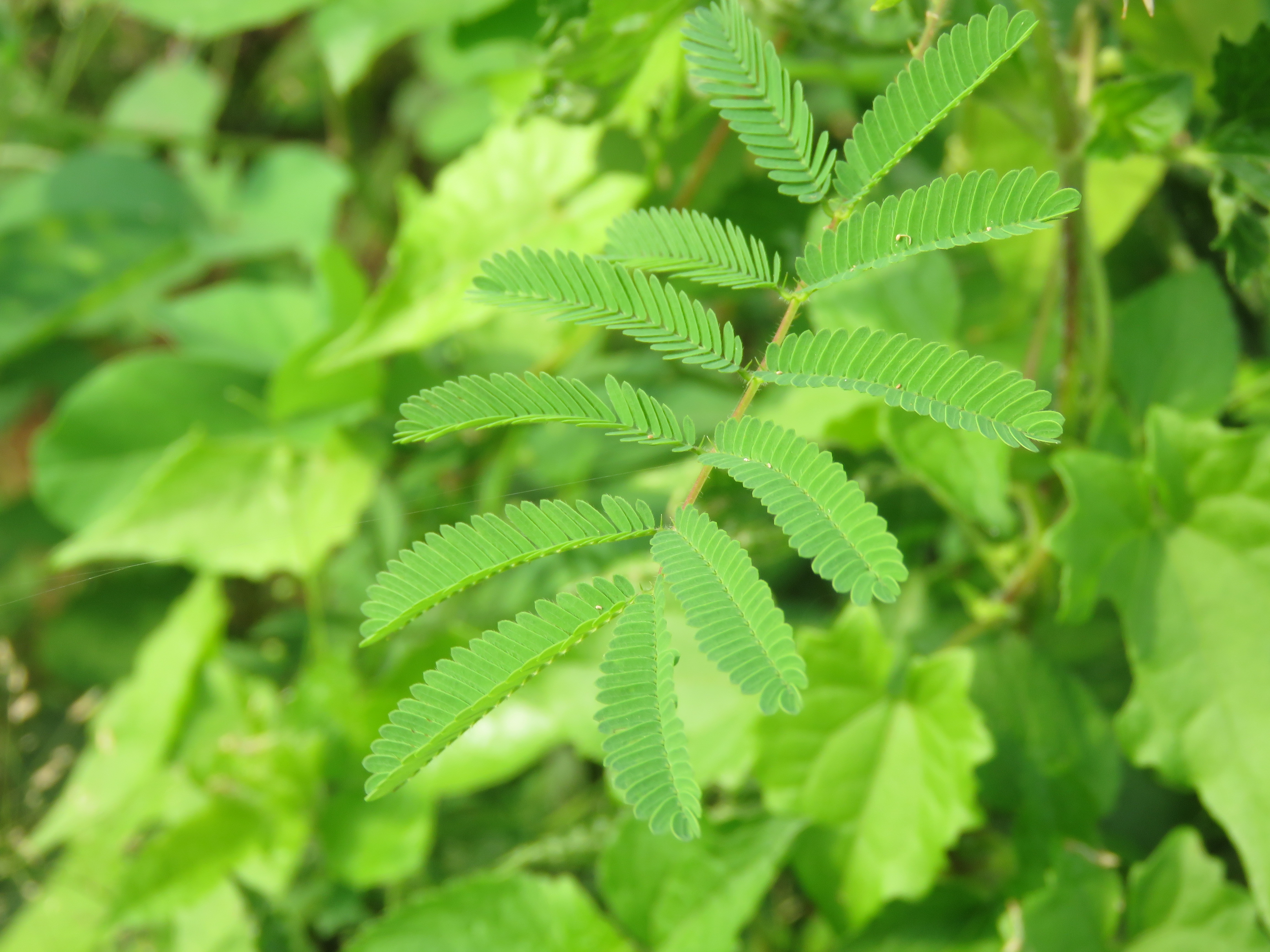 Photos by Vinayaraj